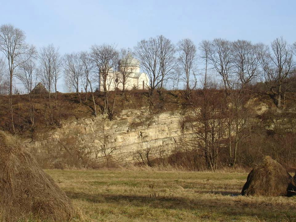 Międzybrodzie am San/Polen